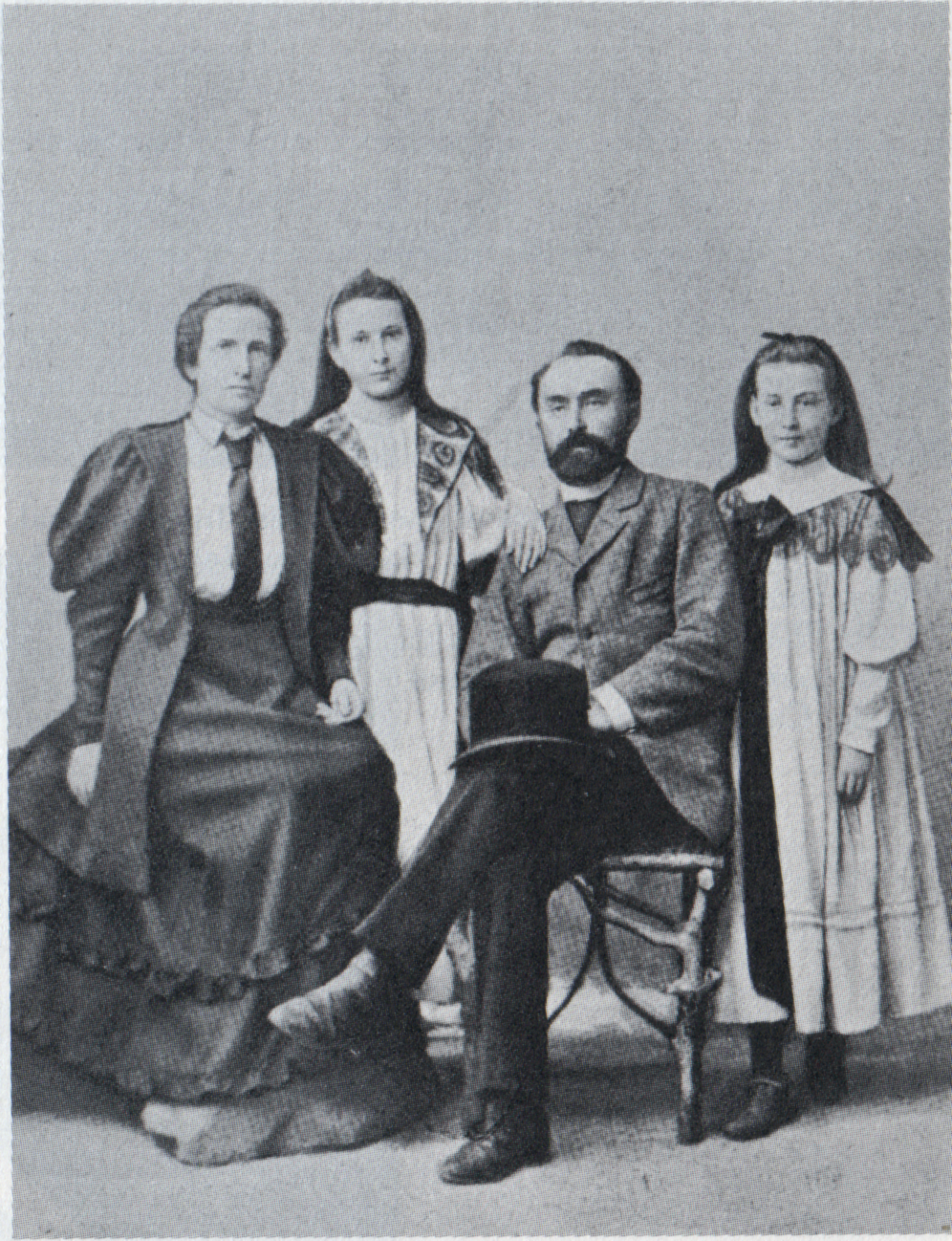 La familia Plejánov en la década de 1890. De izquierda a derecha: Rosalía Markovna , Lidia, Georgi Plejánov y su otra hija, Eugenia.